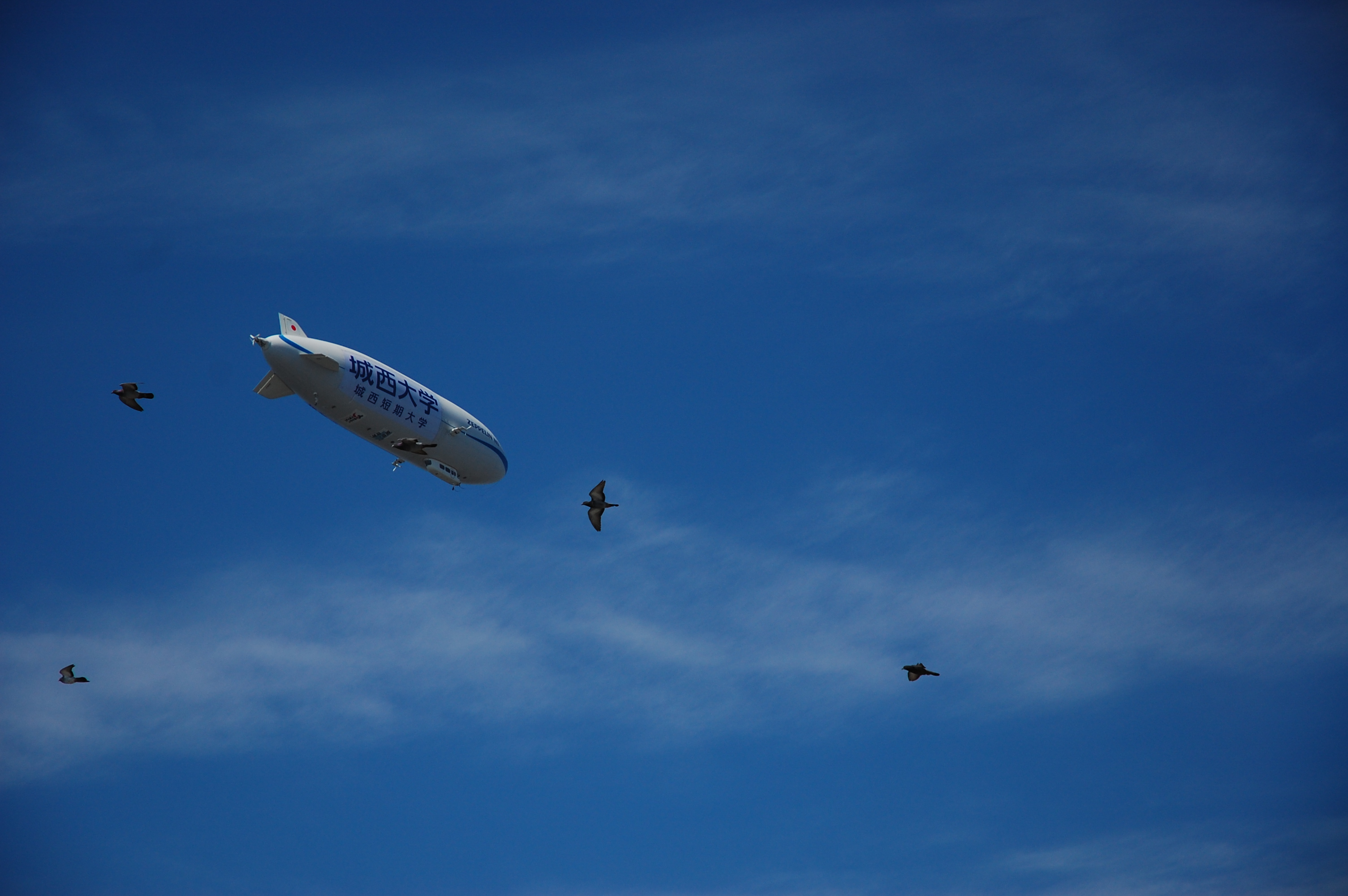 On chillait sur la plage de Kamakura lorsqu on a vu apparaitre un ballon dirigeable. Si je ne m abuse, c est la premiere fois que j en voyais un.